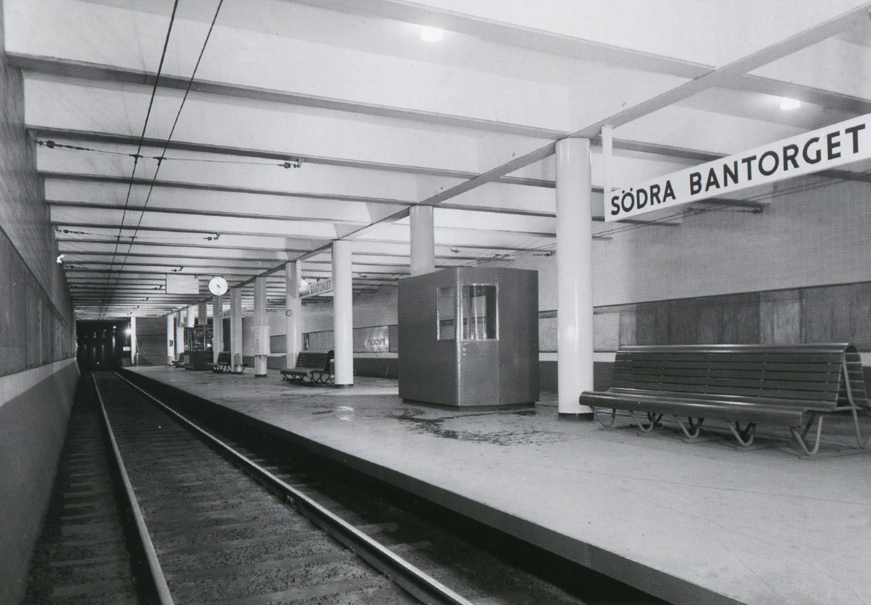 Station: Södra Bantorget, "Medborgarplatsen"